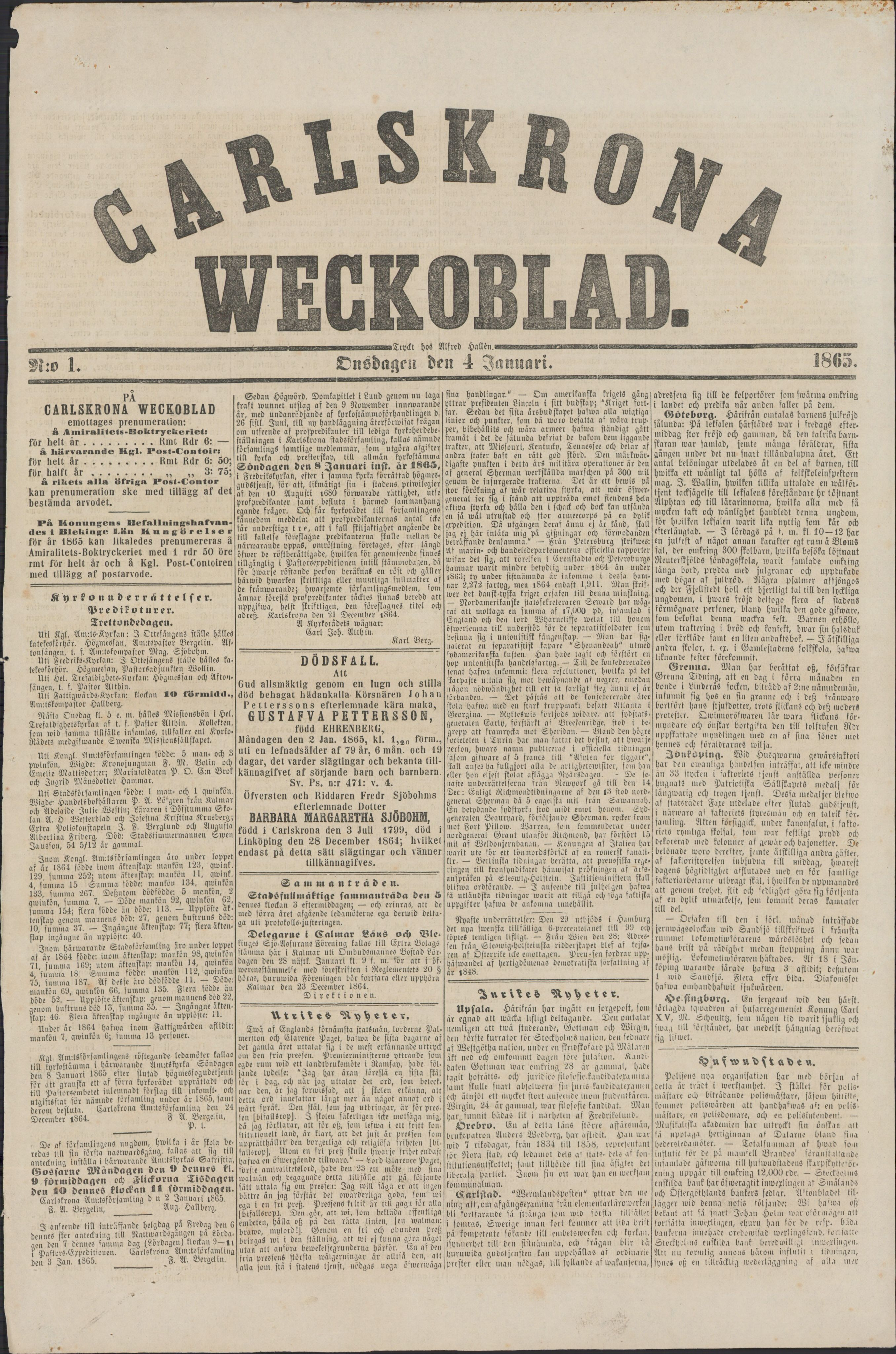 Carlskrona Weckoblad den 4 januari 1865, det första numret med ett nytt sidhuvud.